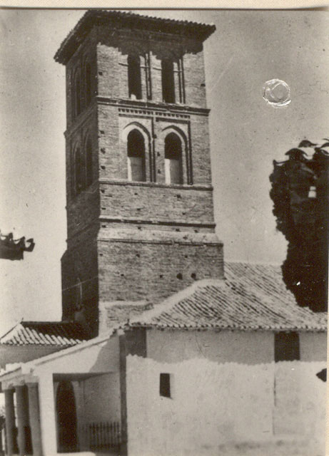 Iglesia de San Pedro. Torre - Villavicencio de los Caballeros (Valladolid) - Cuaderno. Álbum de Valladolid - Fotografía 42 x 60 B/N